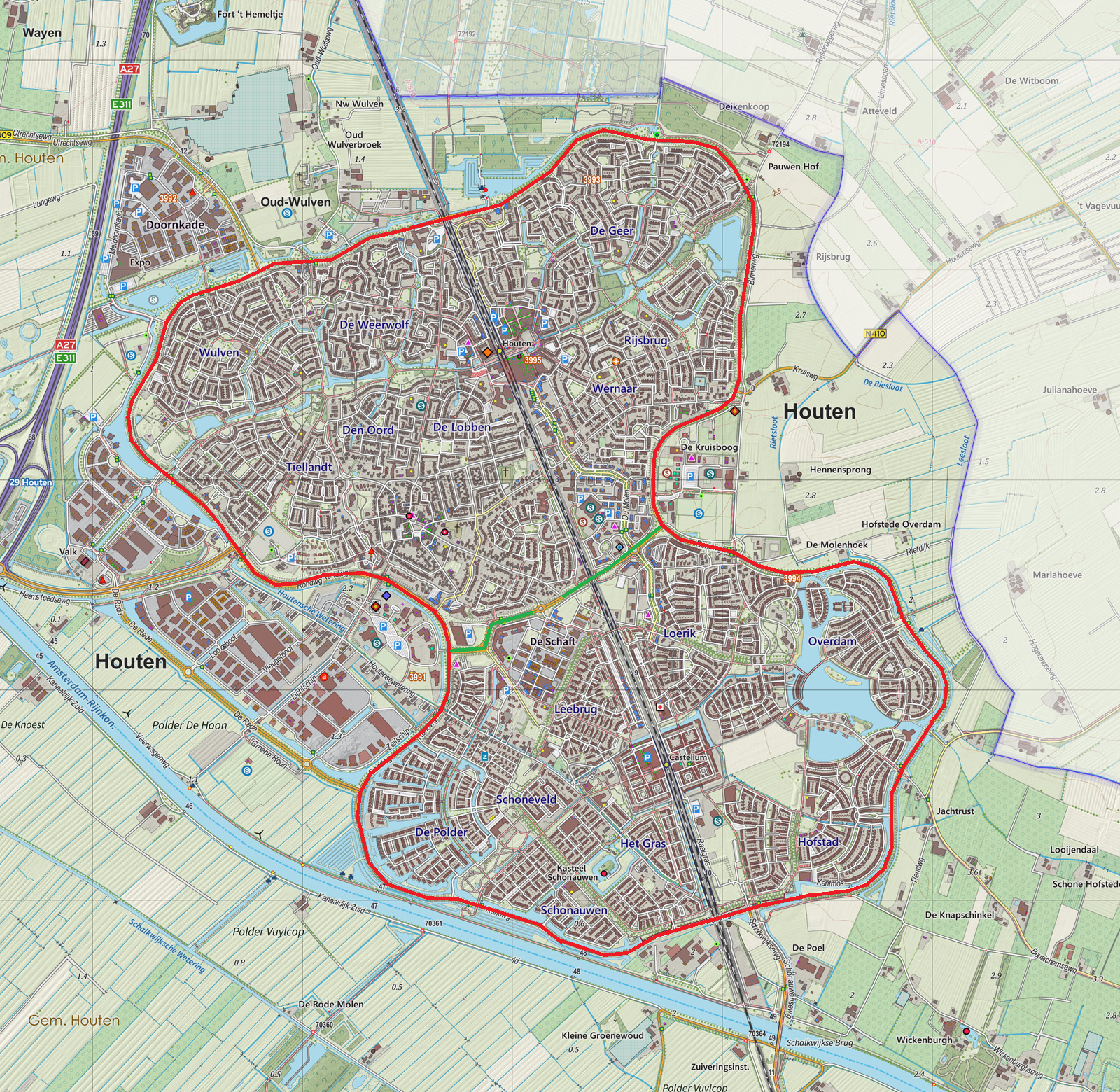 Houten Ringweg. Topografische kaart van Houten (woonplaats). Resolutie: 300 pixels/km. Kaartbeeld samengesteld uit de open geodata van de Top10NL en Top25namen (Basisregistratie Topografie, Kadaster), Creative Commons BY licentie. Gebouwvlakken uit open geodata BAG extract. Wegen uit de OpenStreetMap. Reliëfschaduw uit de Actuele Hoogtekaart AHN2. Samenstelling en kleurenschema: Jan-Willem van Aalst, met QGIS2. Zie ook de Legenda.